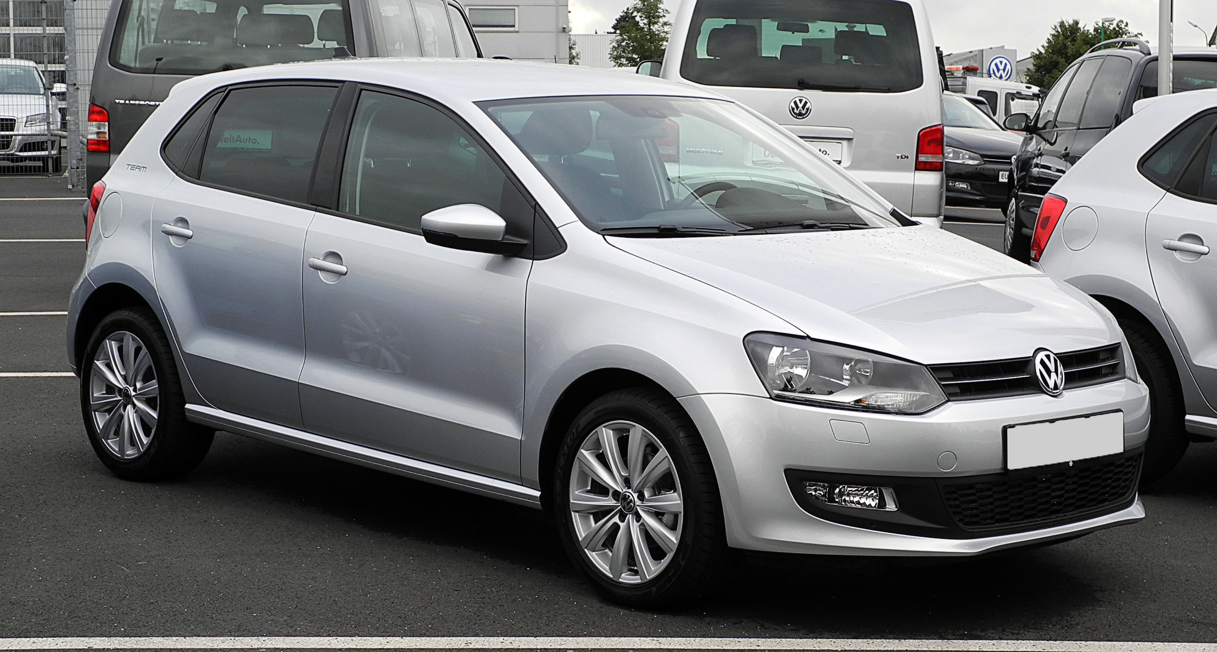 VW Polo 1.4 Team (V)